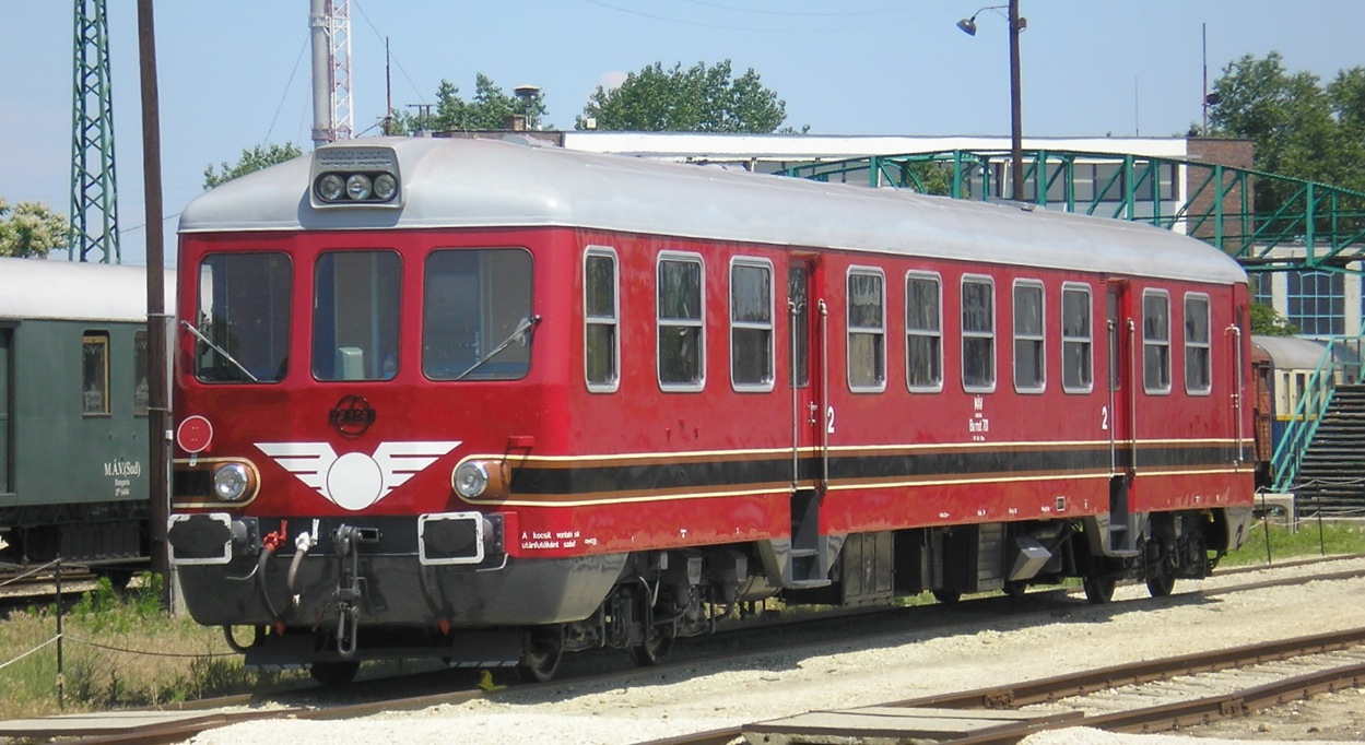 Rába-Balaton (Bamot 701) Hungarian diesel multiple unit